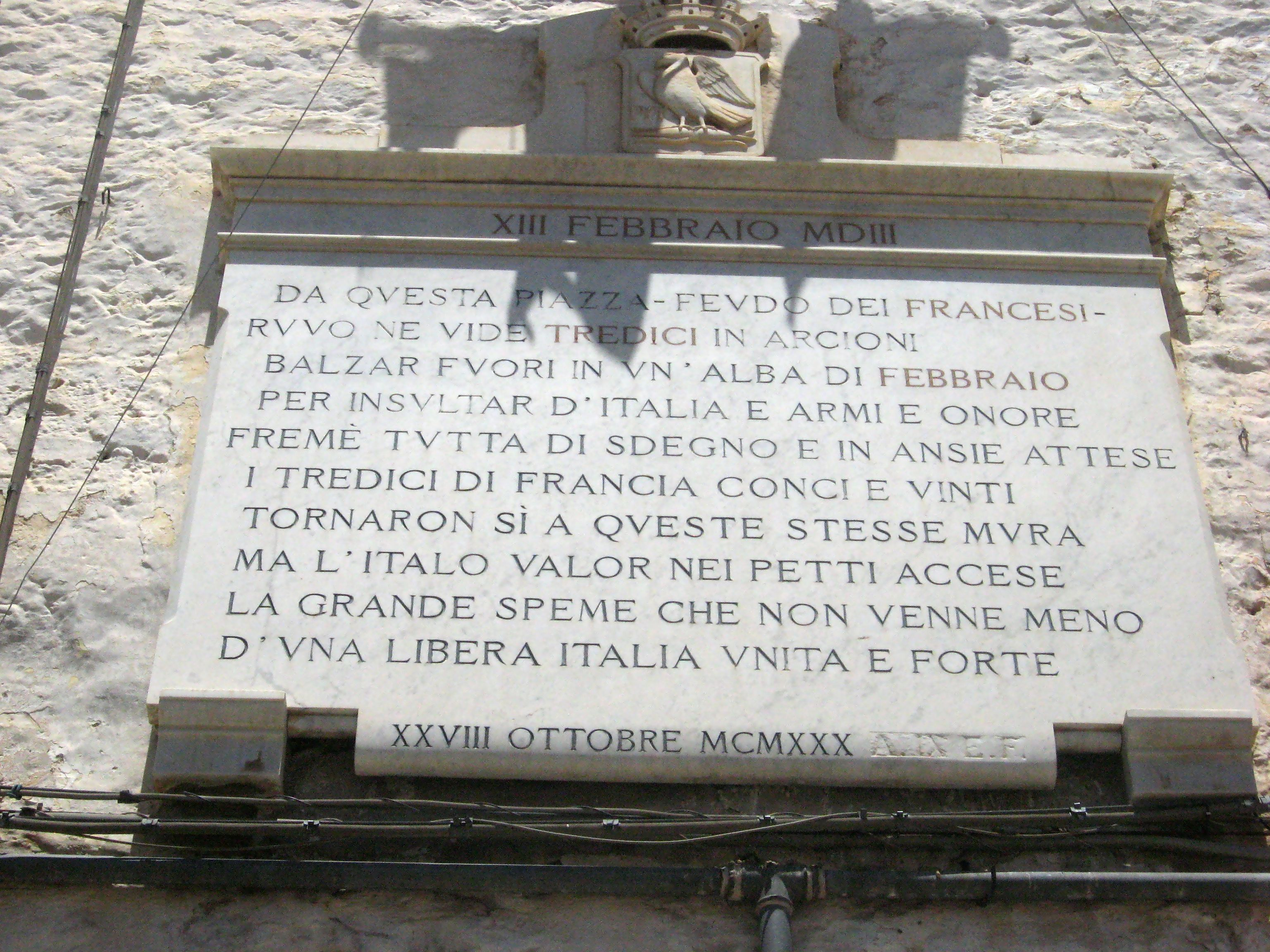 Monumento di Ruvo di Puglia alla Disfida di Barletta